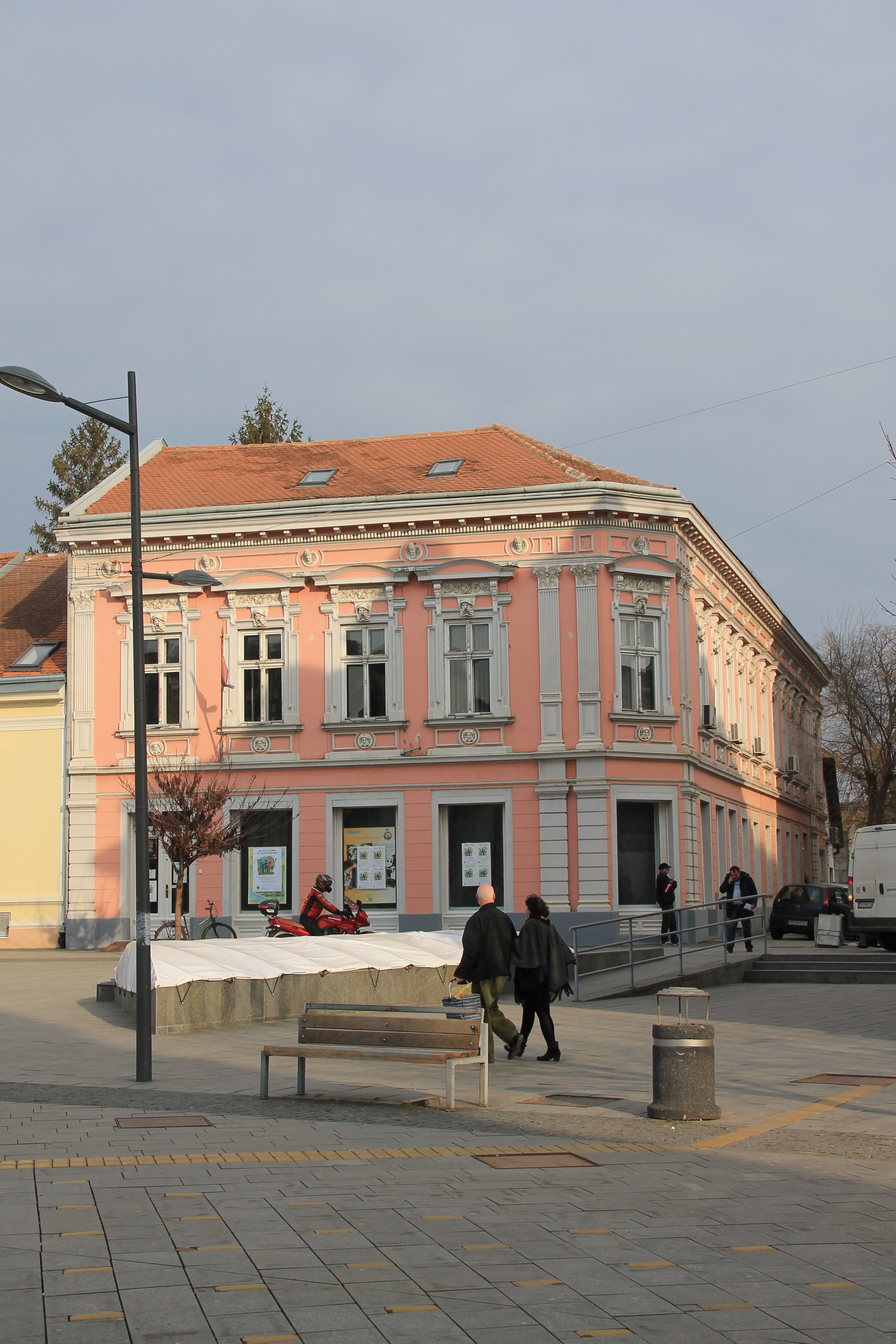 Staro jezgro Zrenjanina